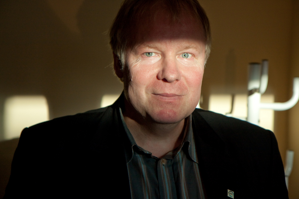 Maastikuökoloog Kalev Sepp Eesti Maaülikoolis.